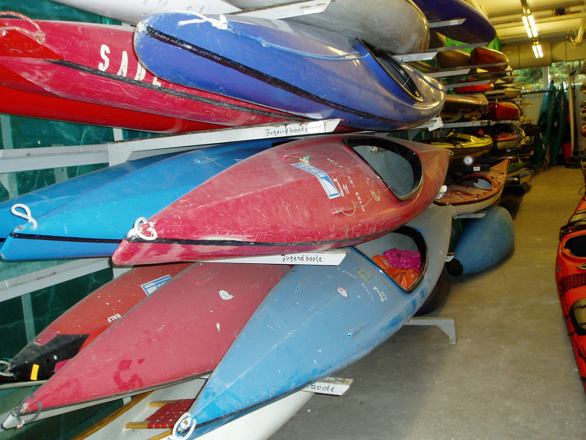 Bootshalle der Kanu-Abteilung. Bootshalle der Kanu-Abteilung des SC Berlin-Grünau. Inneres einer Bootshalle, hier die des SC Berlin-Grünau.